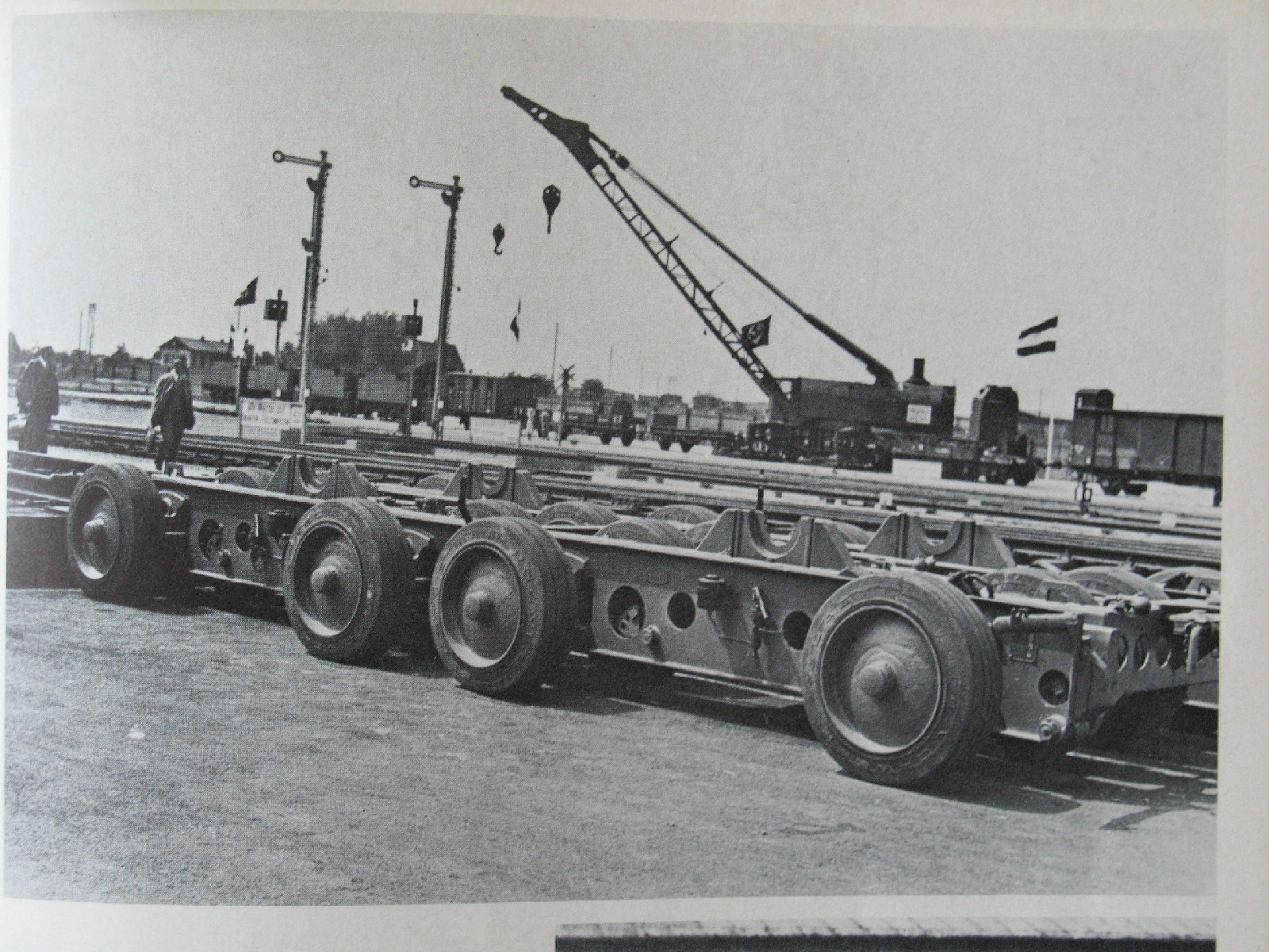 Zweiteiliger 16-rädriger Straßenroller nach Culemeyer-Bauart auf der Reichsbahn-Ausstellung in Nuernberg 1935 / Heavy duty trailer from Culemeyer.